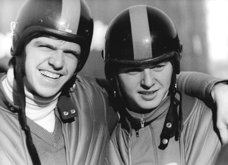 Hans Rinn, Norbert Hahn ADN-ZB Wendorf-hf-20.1.1974-Oberhof: Rinn-Hahn in Front-Im Kampf um die DDR-Rennschlitten-Meisterschaften 1974 wurde am 20.1.1974 die erste von zwei Etappen abgeschlossen. Das Vizeweltmeister-Doppel Hans Rinn (l.)-Norbert Hahn (ASK Oberhof) gewann als Titelverteidiger die ersten Wertungsrennen. Am nächsten Wochenende folgt dann auf der Kunsteisbahn in Oberhof die endgültige Entscheidung.